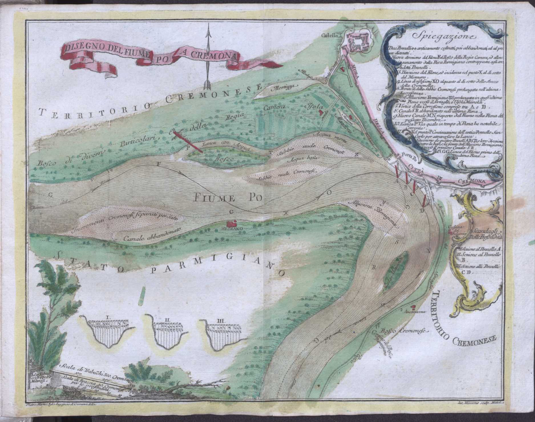 fiume Pò nei territori di Cremona tratto da Del riparo de' pennelli alle rive del Po di Cremona